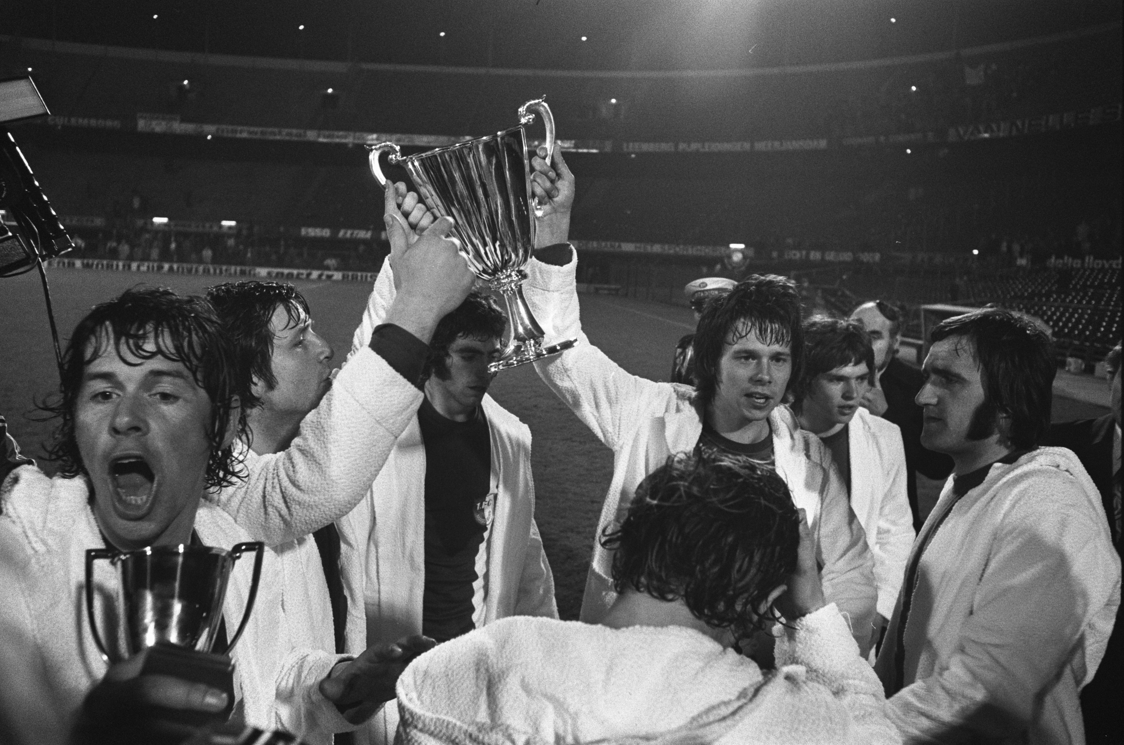 Collectie / Archief : Fotocollectie Anefo Reportage / Serie : [ onbekend ] Beschrijving : AC Milan tegen FC Magdeburg 0-2, finale Europacup II spelers met beker Datum : 8 mei 1974 Trefwoorden : bekers, sport, voetbal Persoonsnaam : Fc Magdeburg Instellingsnaam : AC Milaan Fotograaf : Verhoeff, Bert / Anefo Auteursrechthebbende : Nationaal Archief Materiaalsoort : Negatief (zwart/wit) Nummer archiefinventaris : bekijk toegang 2.24.01.05 Bestanddeelnummer : 927-1798